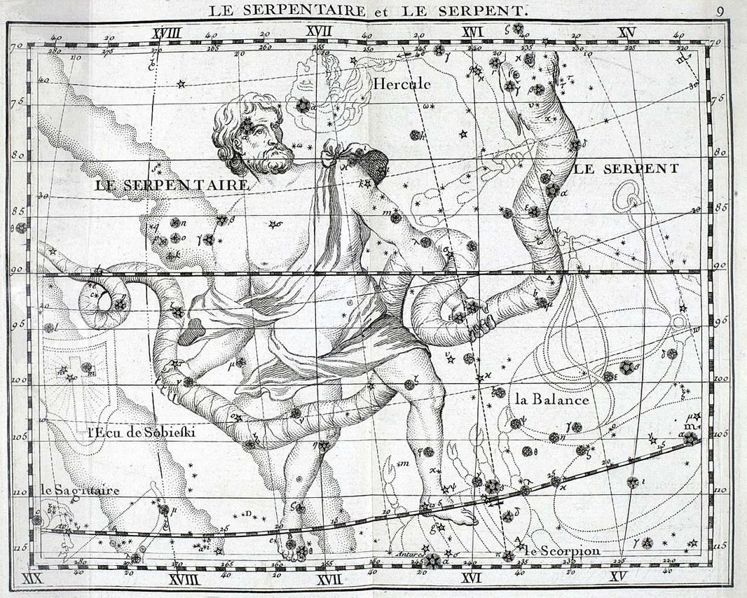 Atlas Coelestis